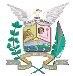 Escudo del Municipio Julio César Salas. Estado Mérida. Venezuela